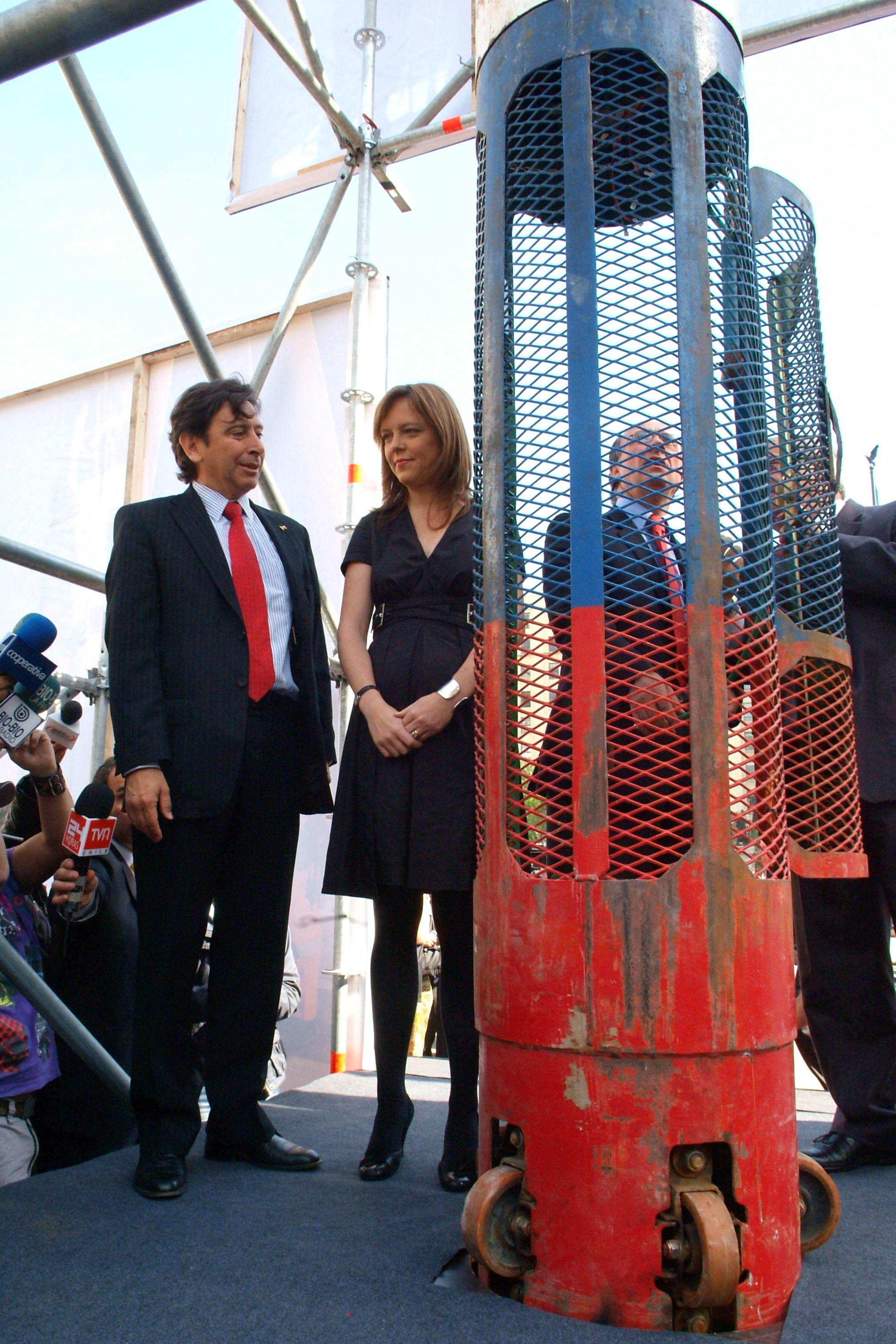 La Ministra Secretaria General de Gobierno, Ena von Baer, participa en la Presentación de la Cápsula Fénix 2. Plaza de la Constitución.